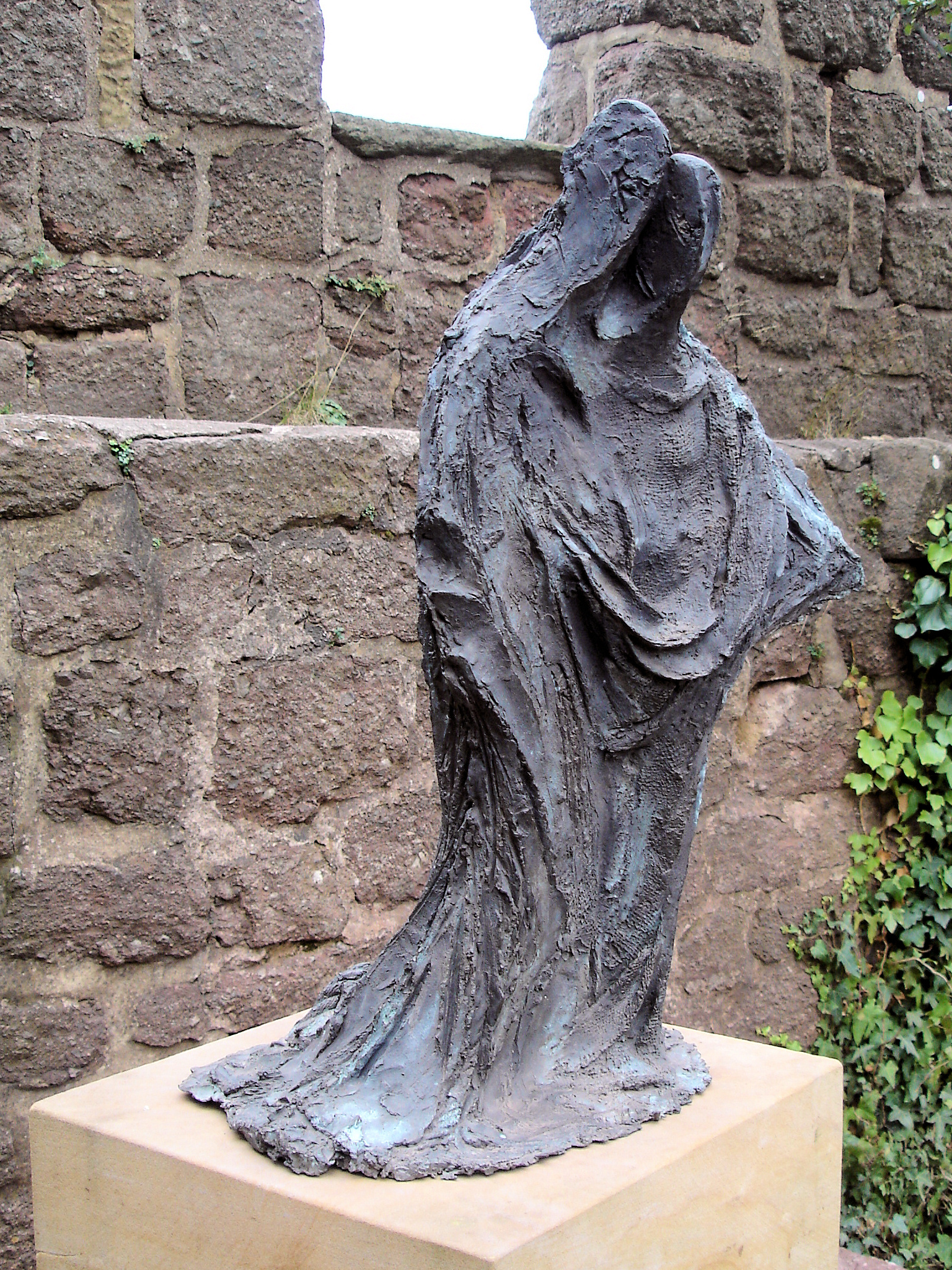 Statue "Die Nackten bekleiden" von Thomas Duttenhoefer auf der Wartburg in Eisenach, Teil einer siebenteiligen Reihe zum 800. Geburtstag der Heiligen Elisabeth von Thüringen 2007